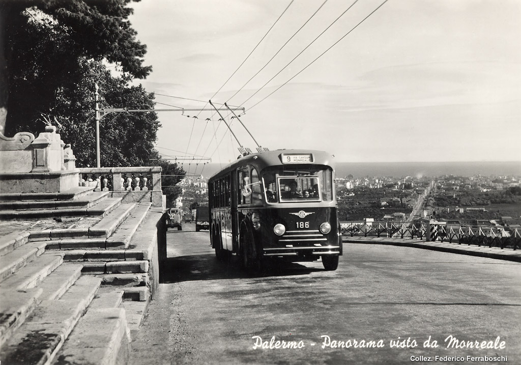 L'Alfa Romeo 110 AF Macchi matricola 186, sulla linea 9 della rete filoviaria di Palermo, gestita dalla SAST, in arrivo a Monreale